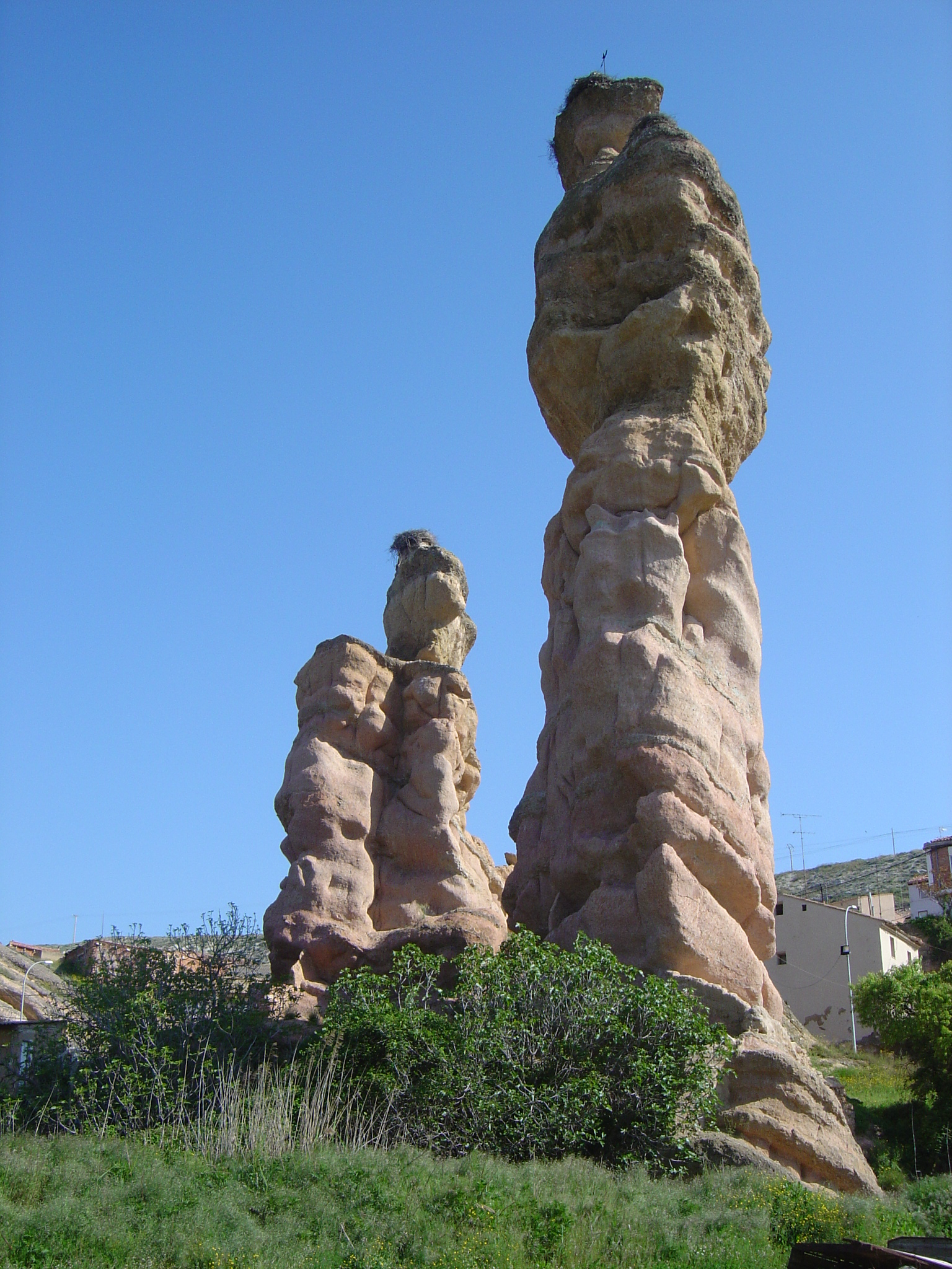 El Picuezo y la Picueza en Autol. Fotografía por comakut.